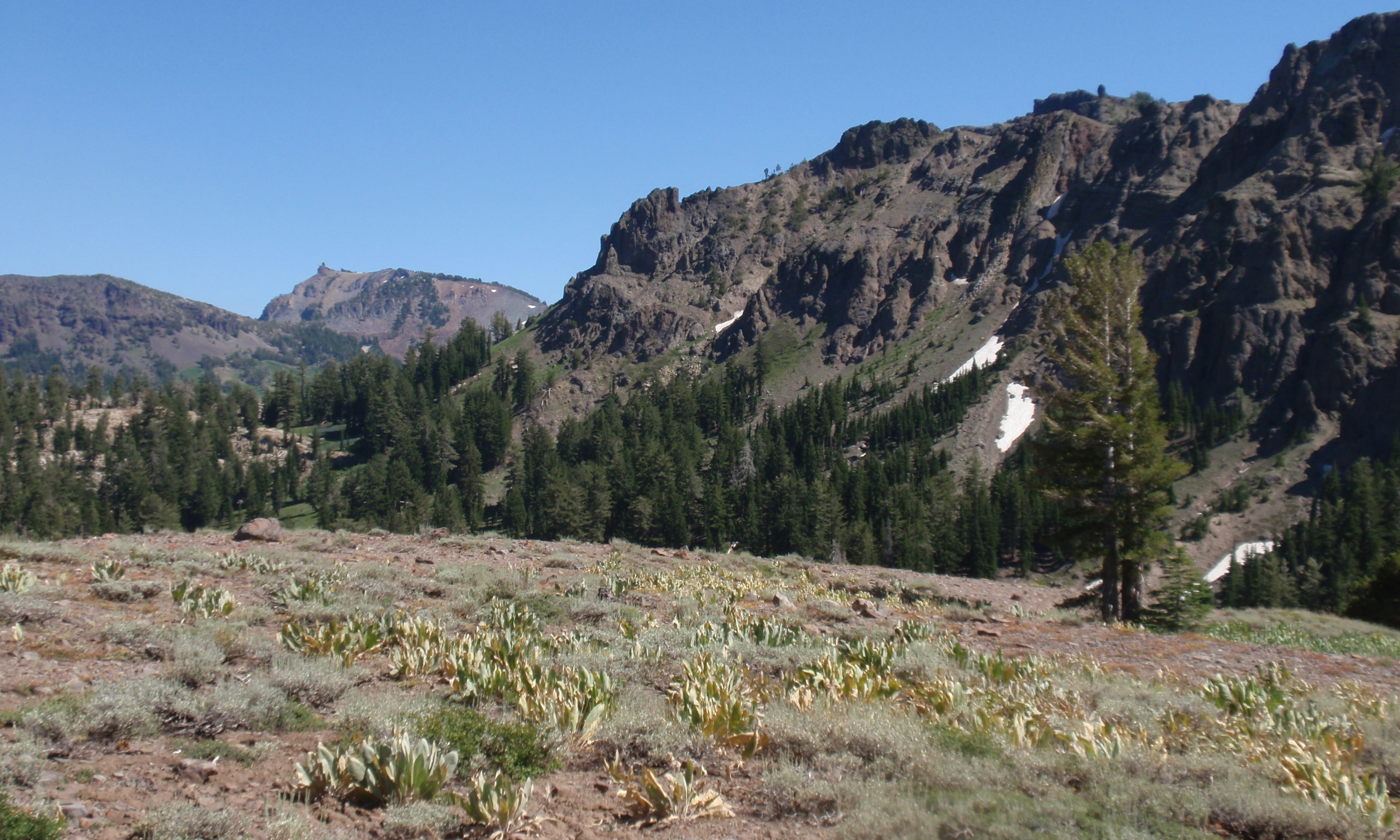 Ebbetts Pass, Sierra Nevada, California